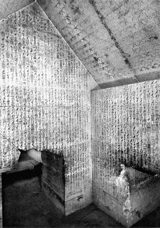 Передняя пирамиды УнасаСеверная (справа) и западная стена